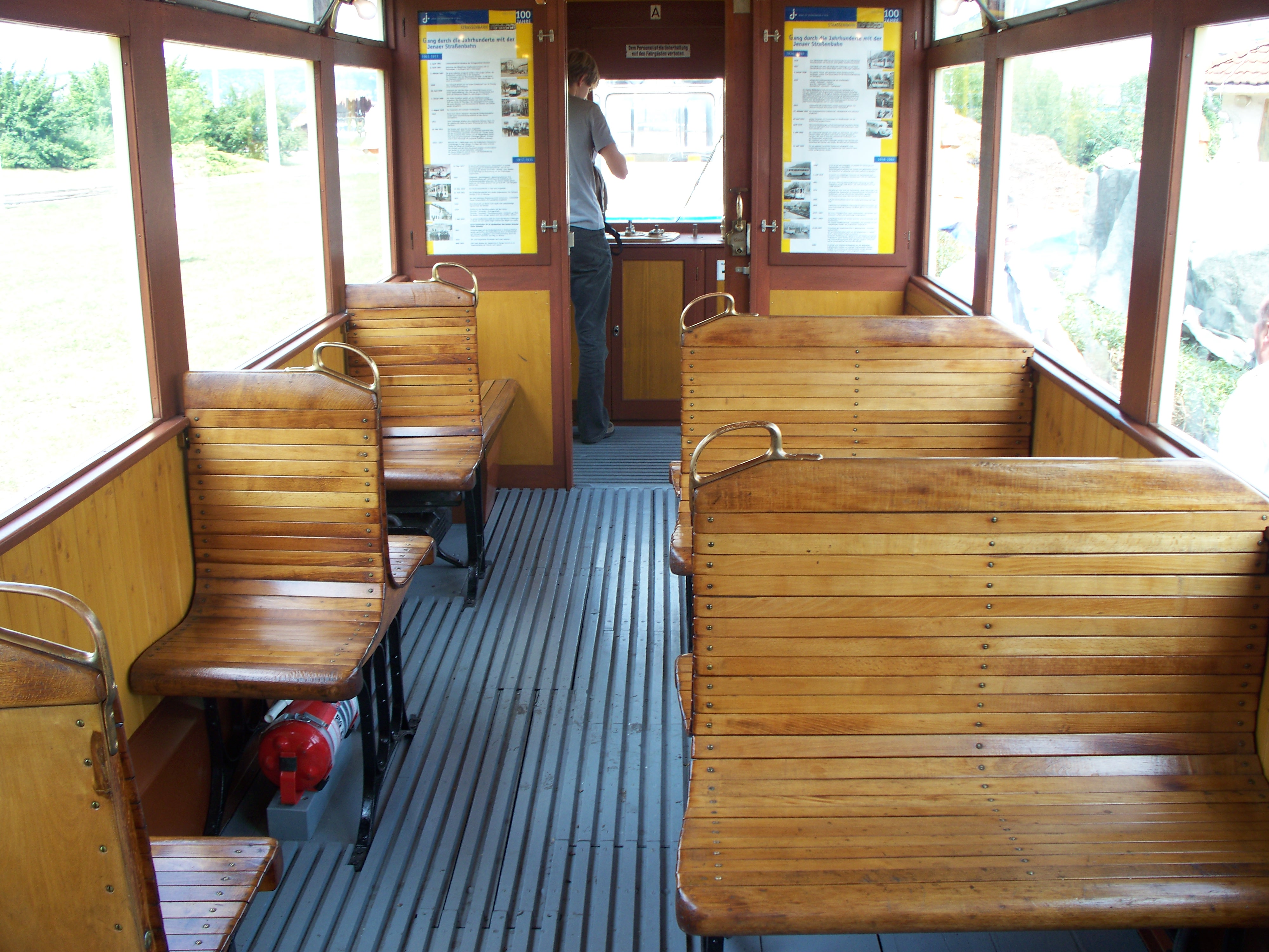 Straßenbahn tw26